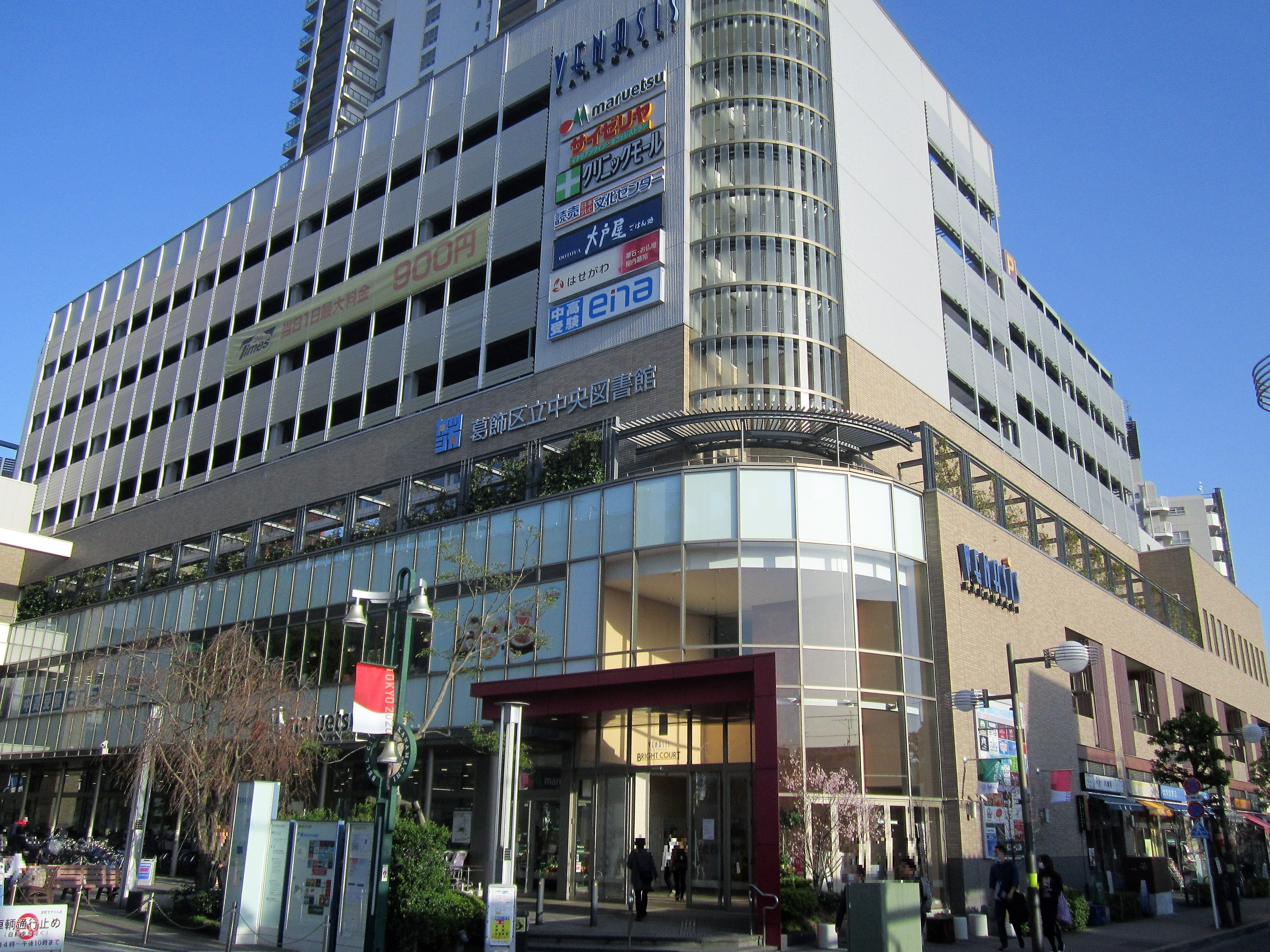 ヴィナシス金町・葛飾区立中央図書館（葛飾区金町）